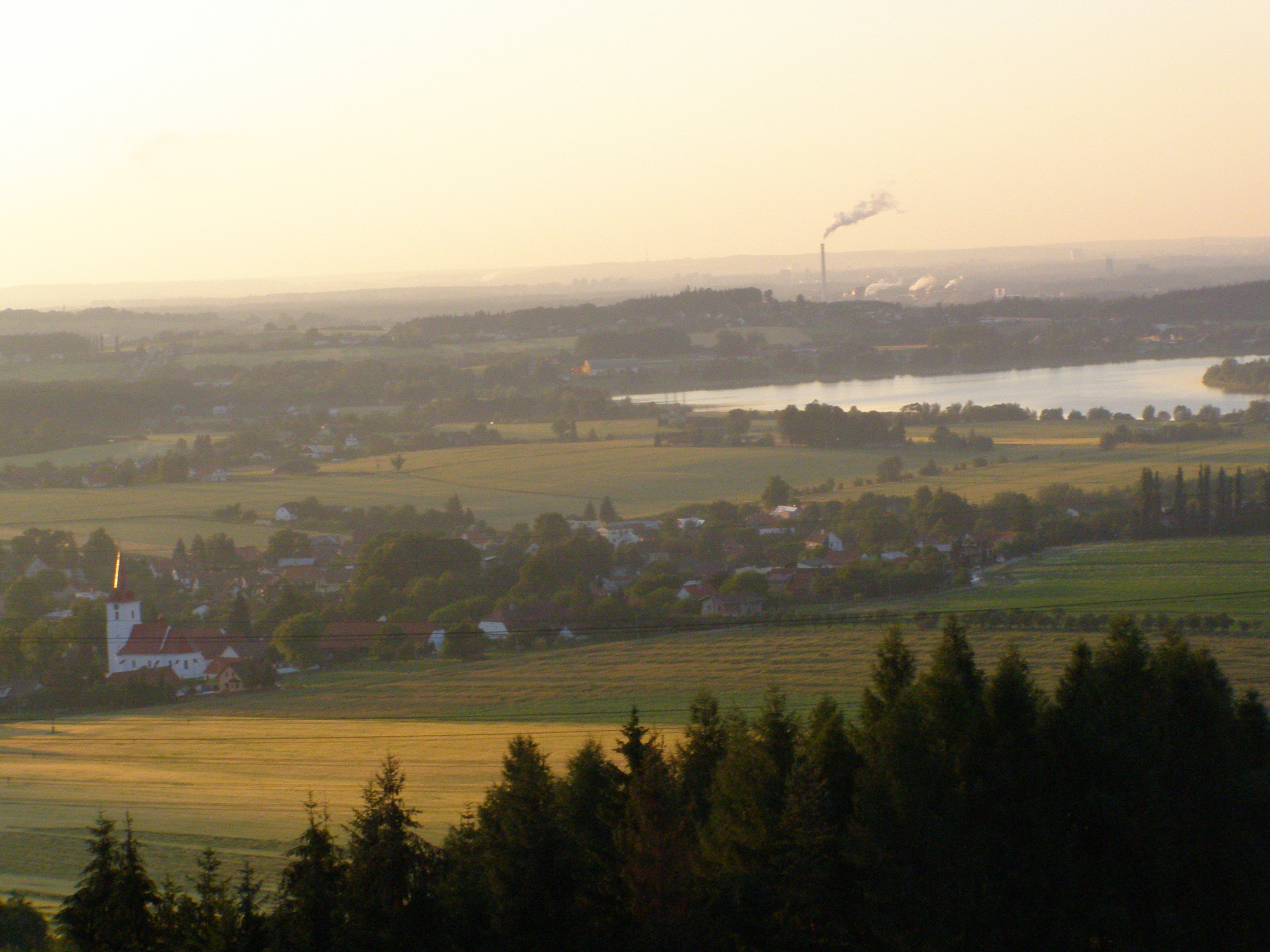 V popředí Palkovické podhůří, obec Palkovice, vpravo vodní nádrž Olešná, v pozadí Ostravská pánev